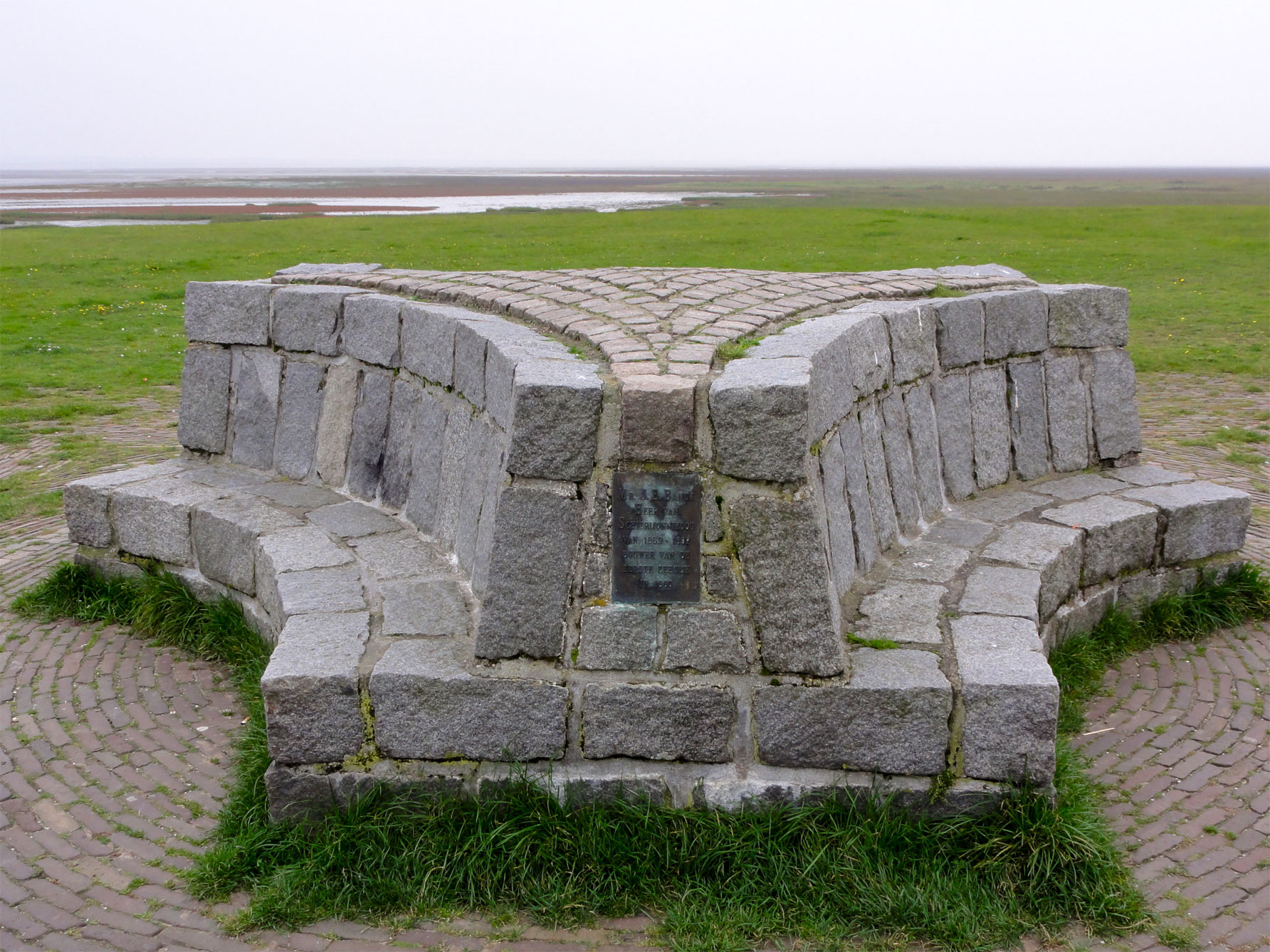 Monument voor Mr. Johan Eric Banck in Schiermonnikoog bij de zeedijk